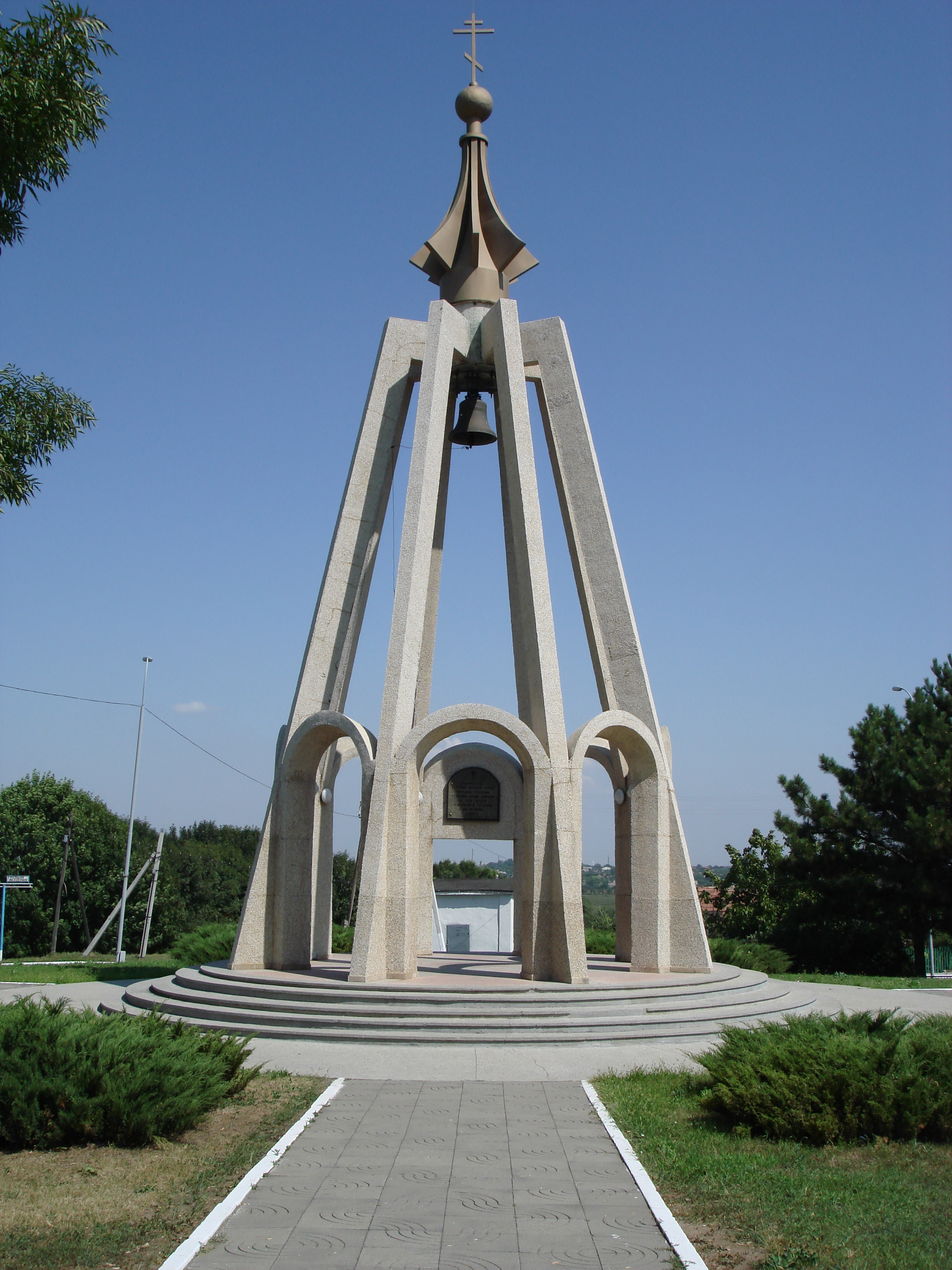 Мемориал Славы (Бендеры)